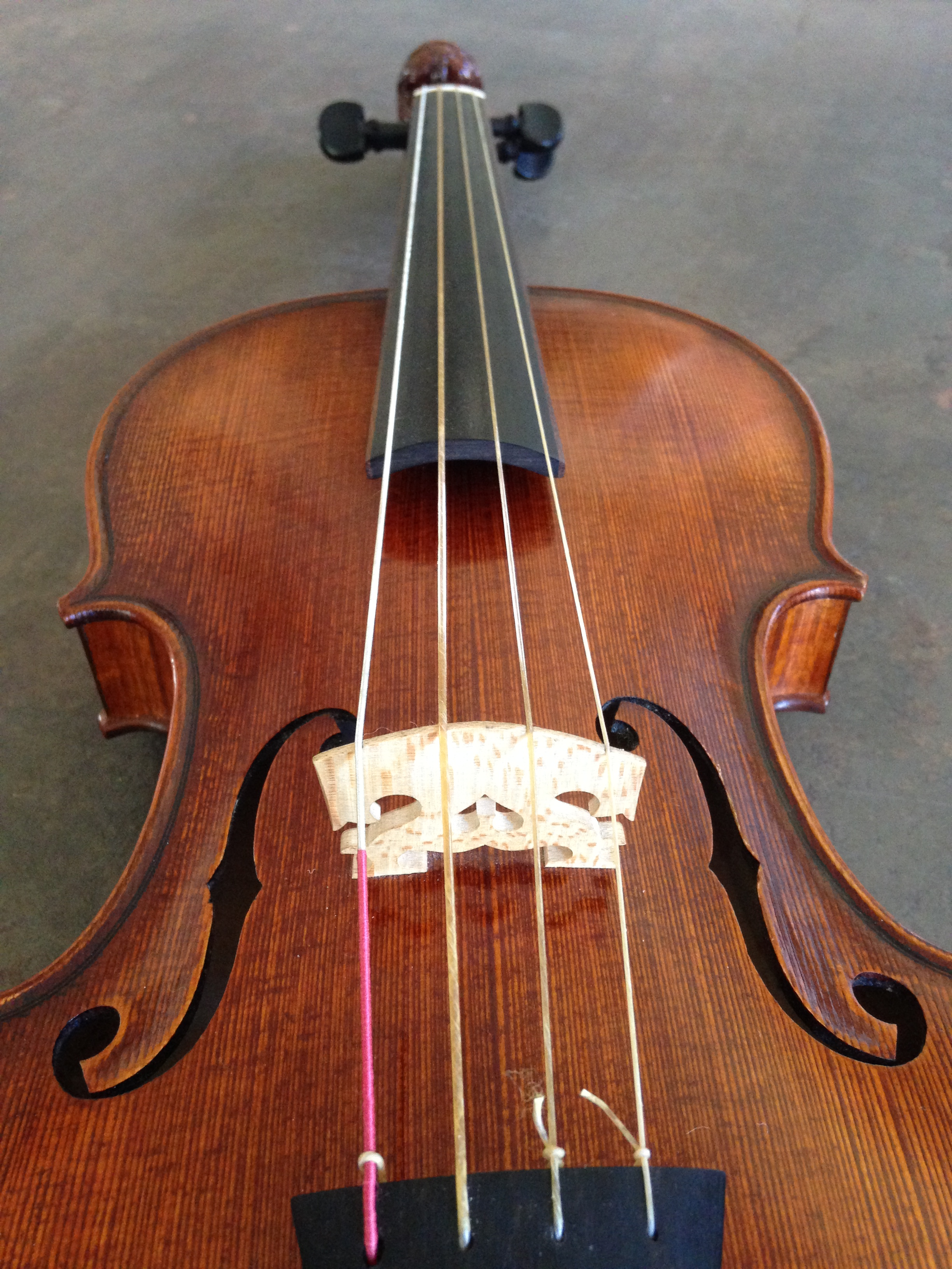 Baroque violin Walter Mahr, 2010 - Gut strings